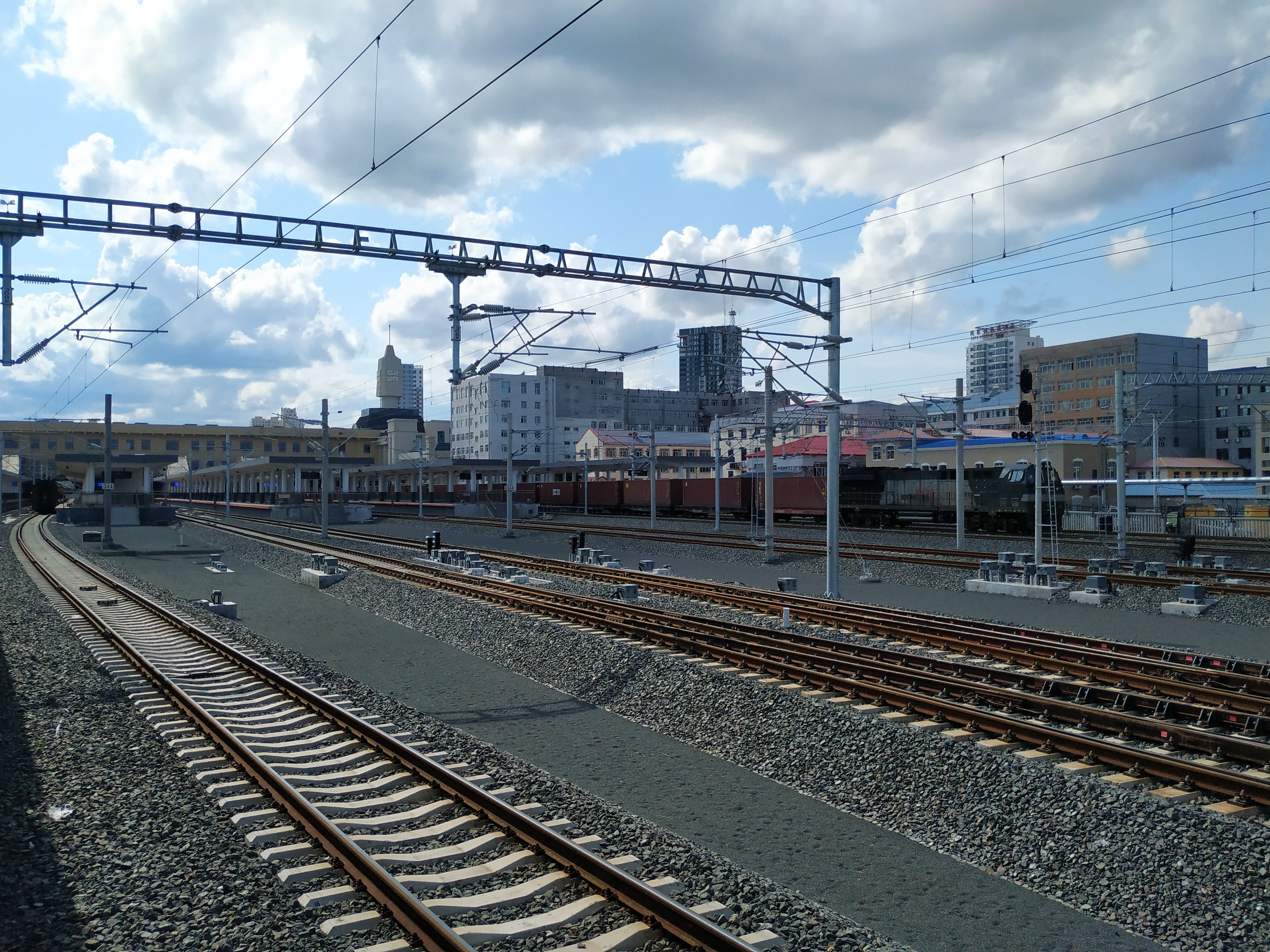 中文（中国大陆）: 佳木斯站轨道